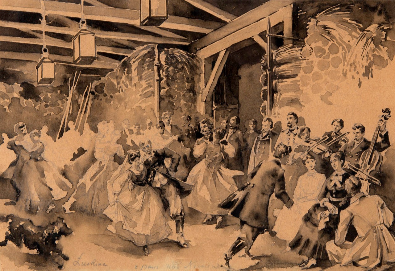 Wesele Elżuni Bohatyrowiczówny i Franciszka Jaśmonta. (Ilustracja do "Nad Niemnem" Elizy Orzeszkowej)